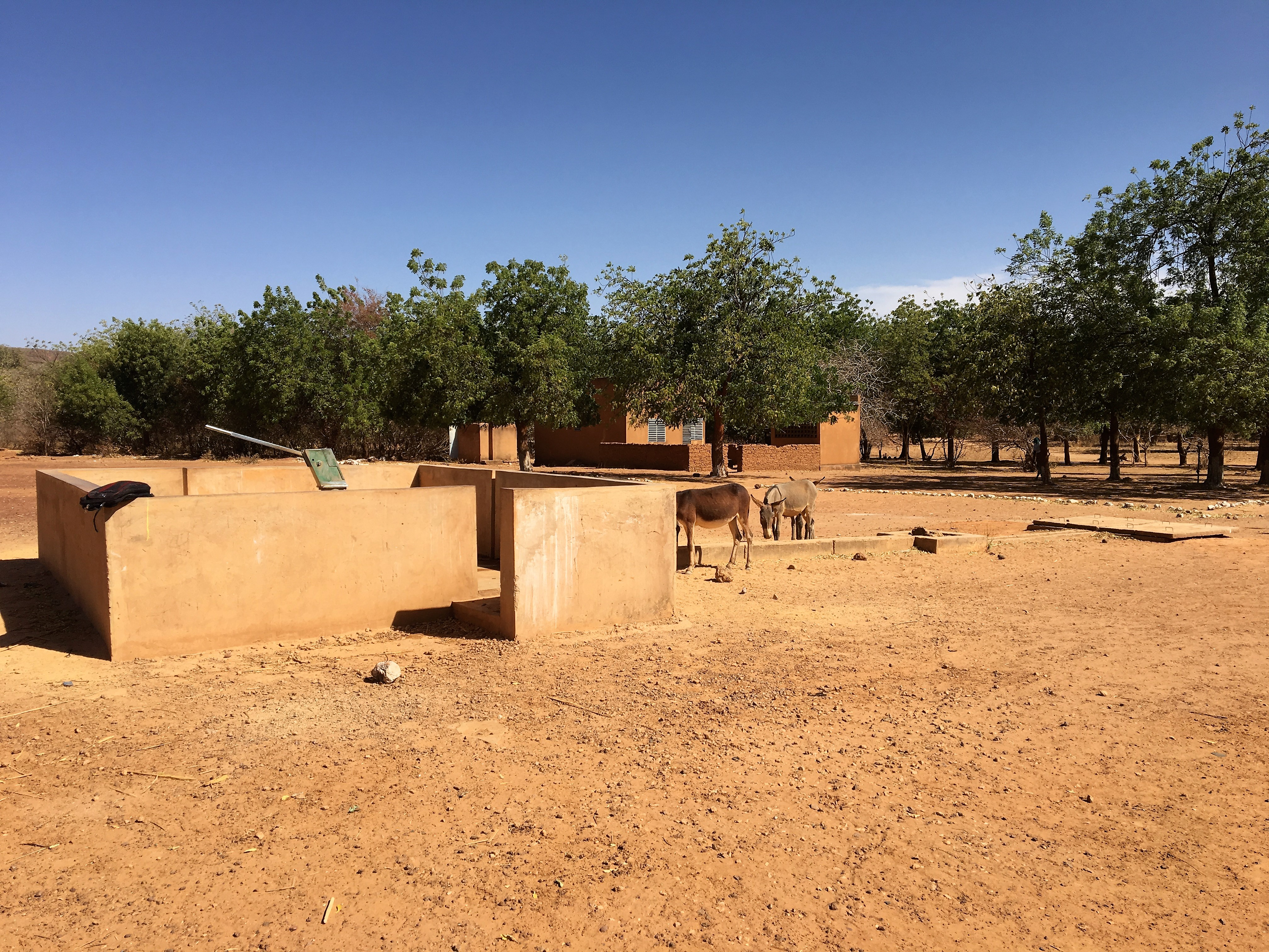 Forage scolaire de Ouazellé, construit en 2013 par SOS Sahel et financé par ASDM